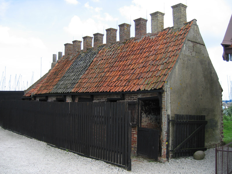 rookoven, oven to smoke food